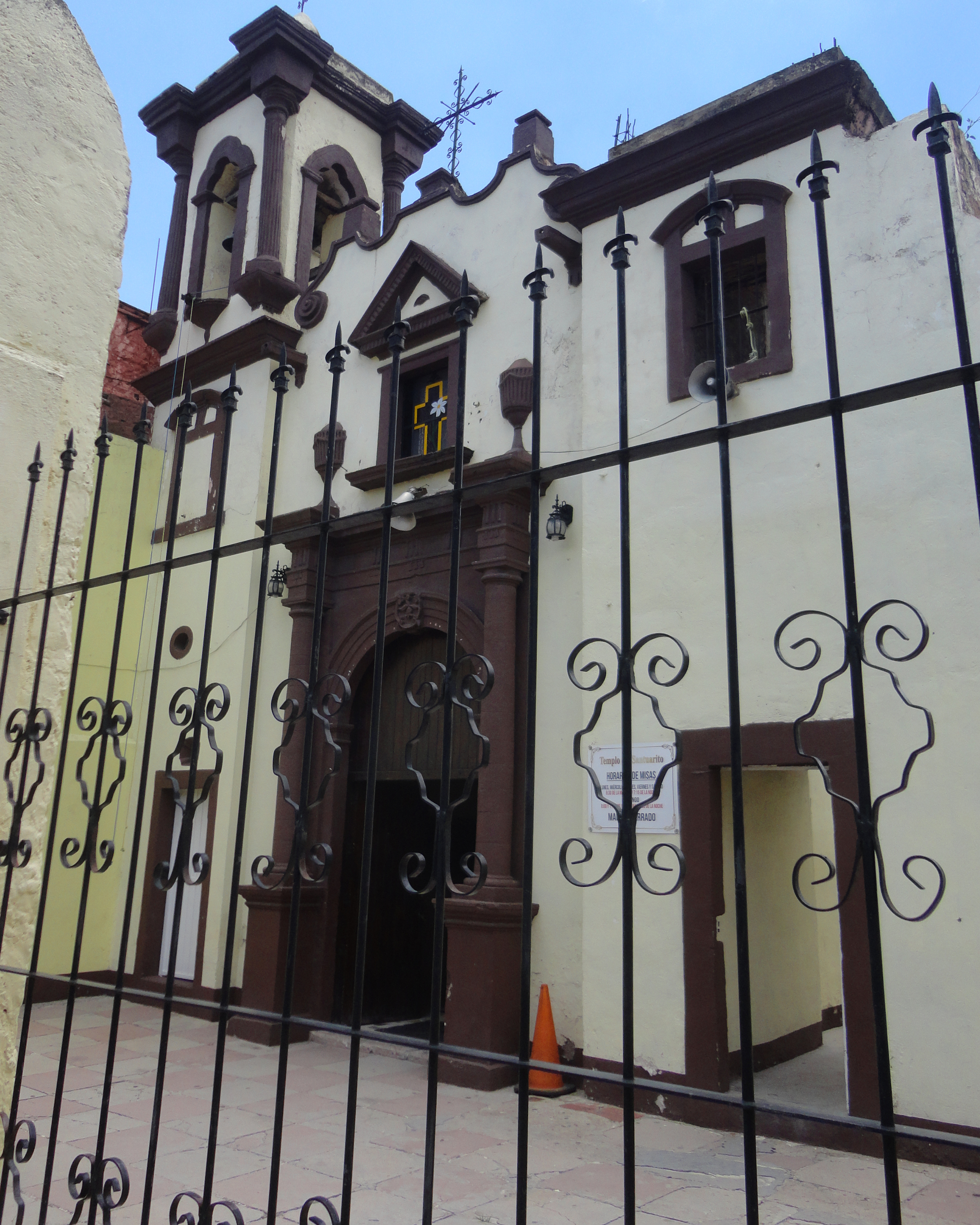 Templo del Santuarito - Silao, Guanajuato, México.